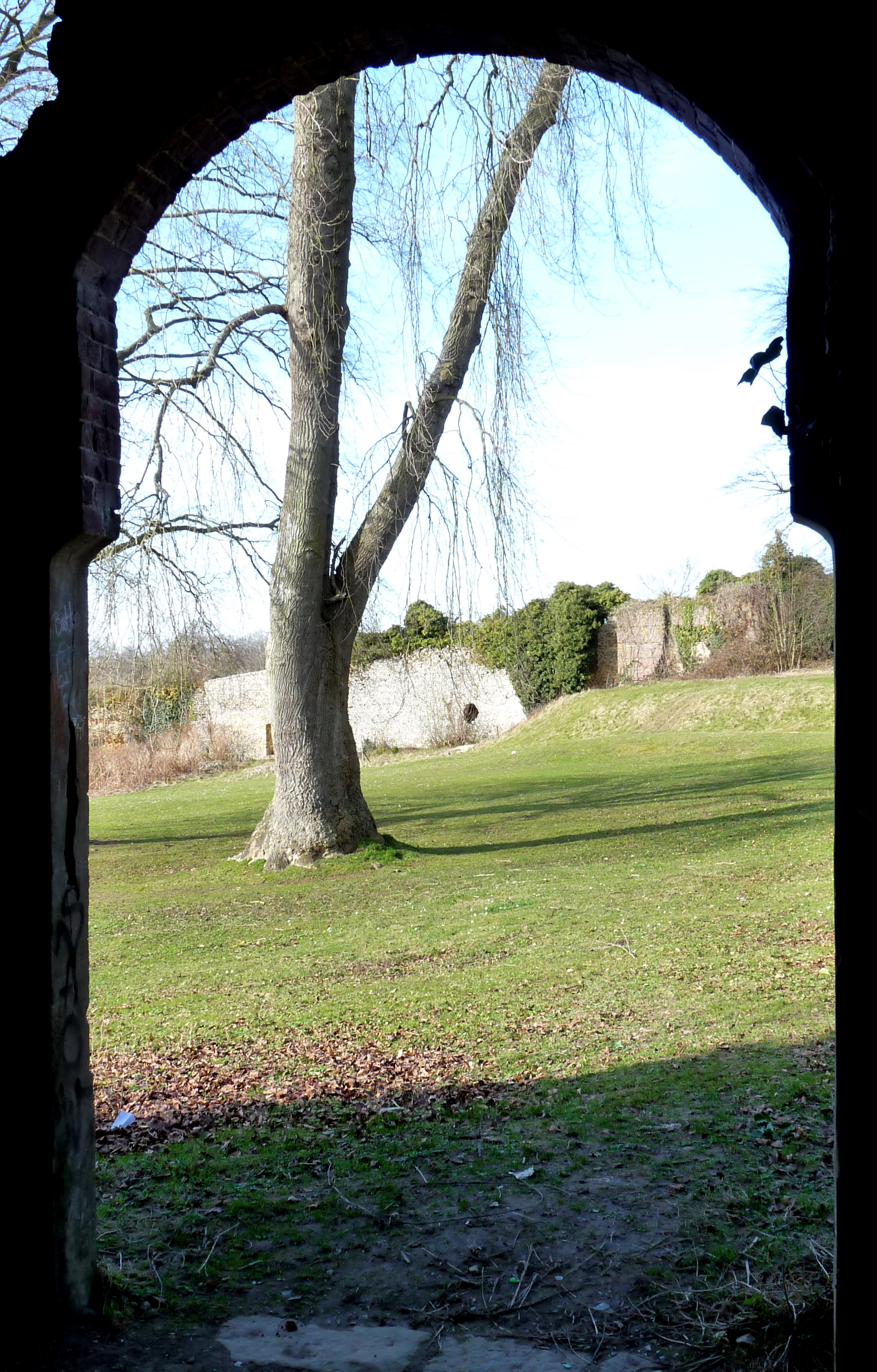 Château de Longueville-sur-Scie